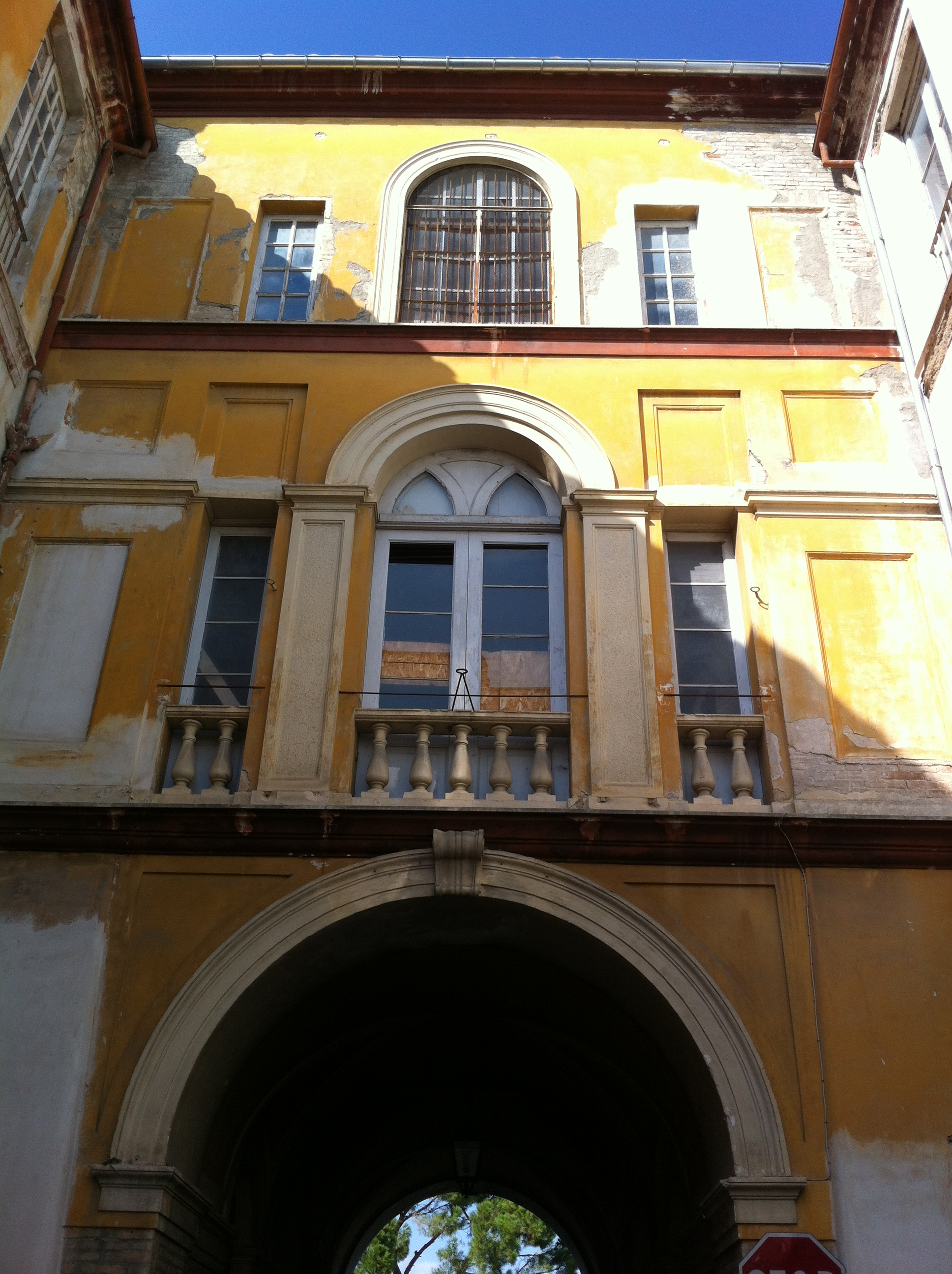 Arco di Porta Melatina: alloggio suore e sala ricreativa